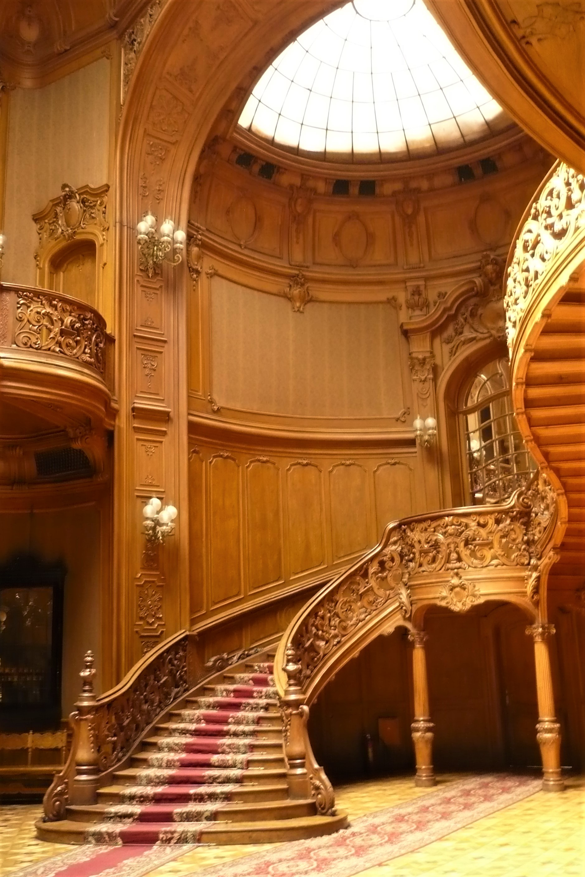 Kasyno Szlacheckie we Lwowie